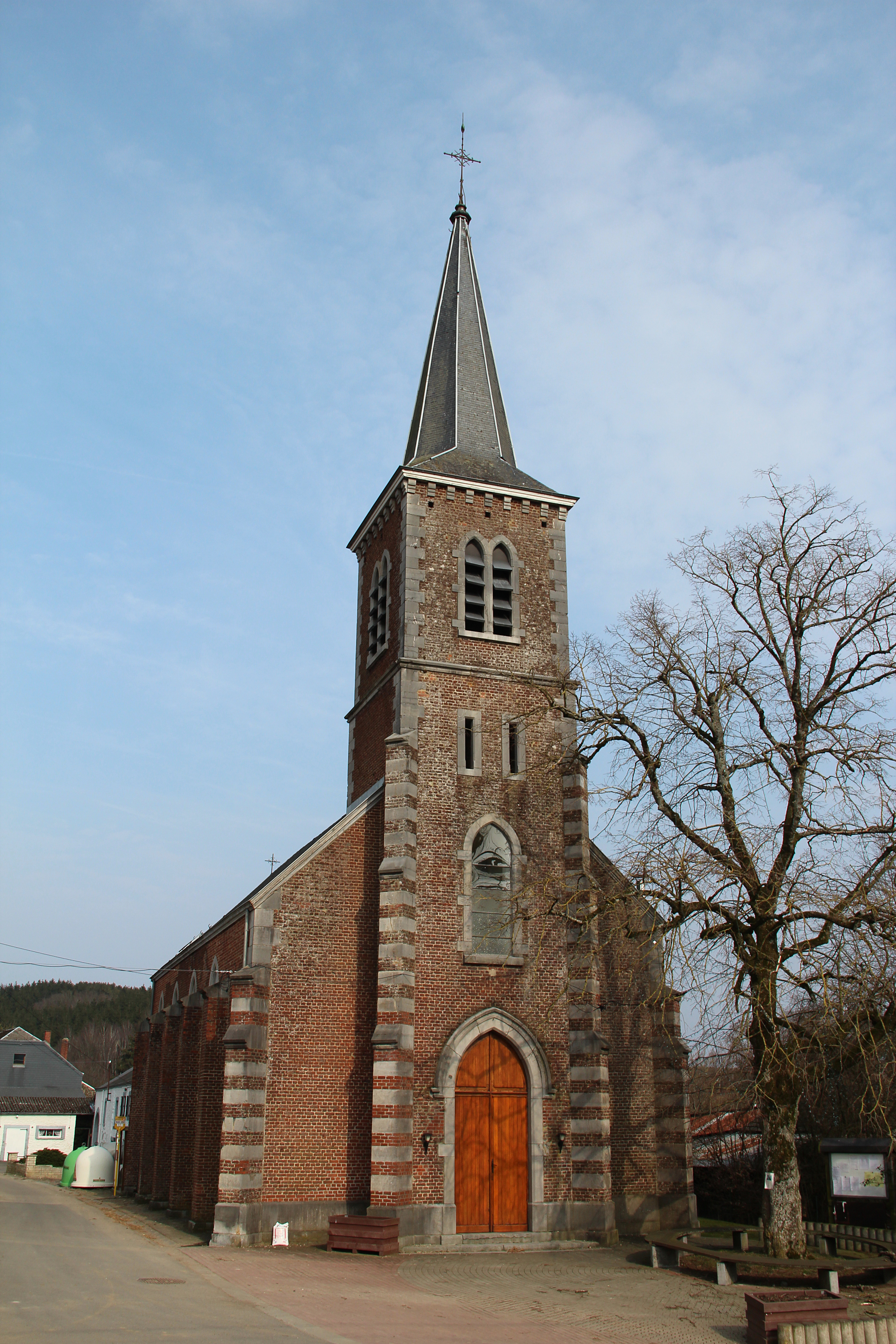 Grimbiémont (Belgique), l'église Saint-Remacle (1872).